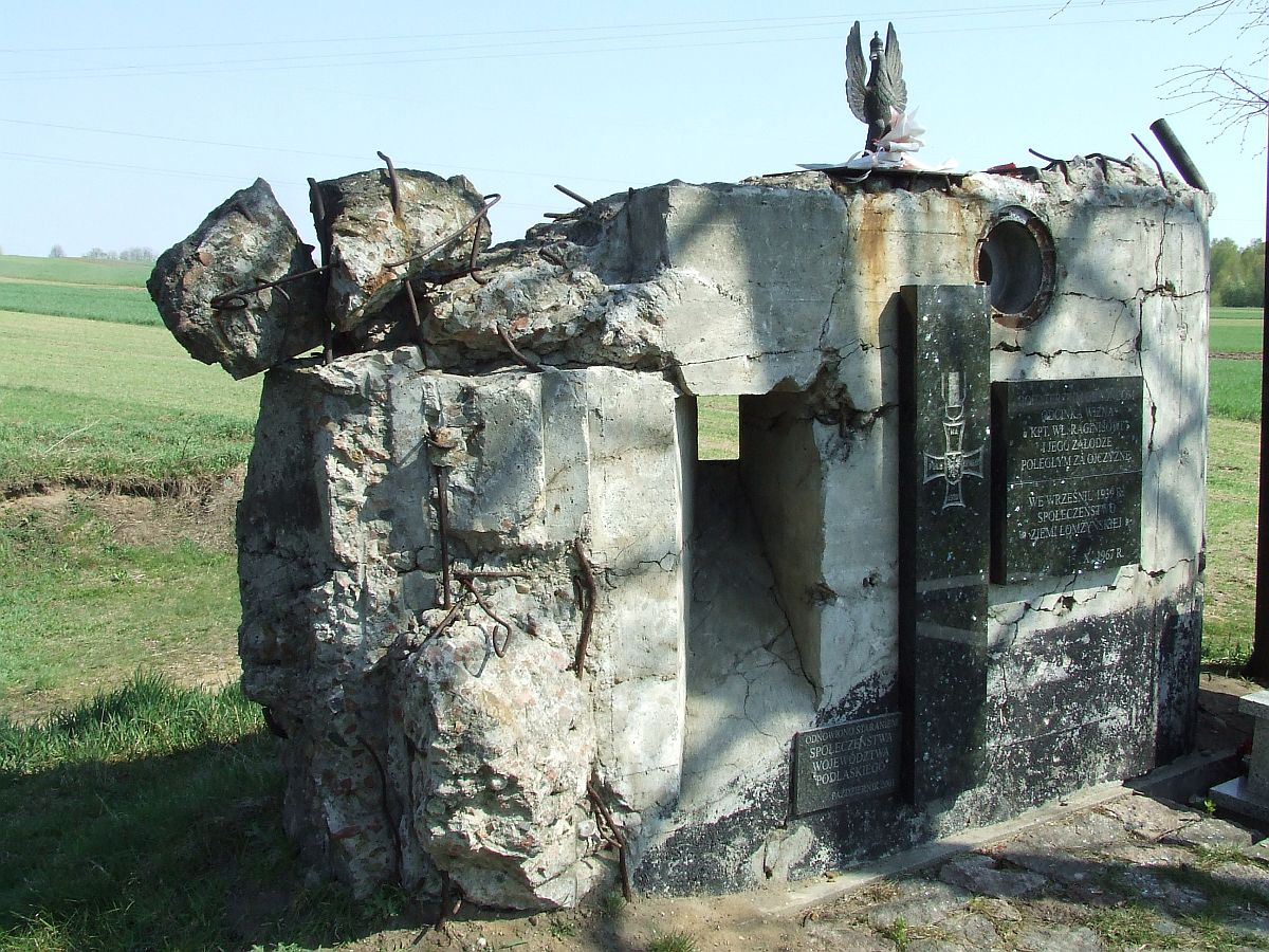 Strękowa Góra, pomnik bitwy pod Wizną 1939